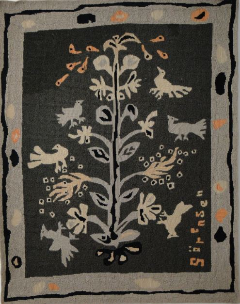 Artista: Carlos Haraldo Sörensen Tapeçaria. 120 x 95 cm Data: Desconhecida